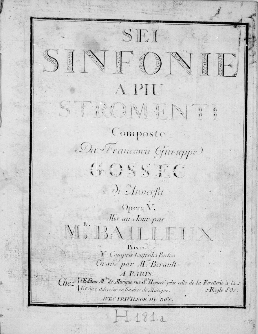 Page de titre des 6 Symphonies op. 5 de François-Joseph Gossec (édition Bailleux, 1762)